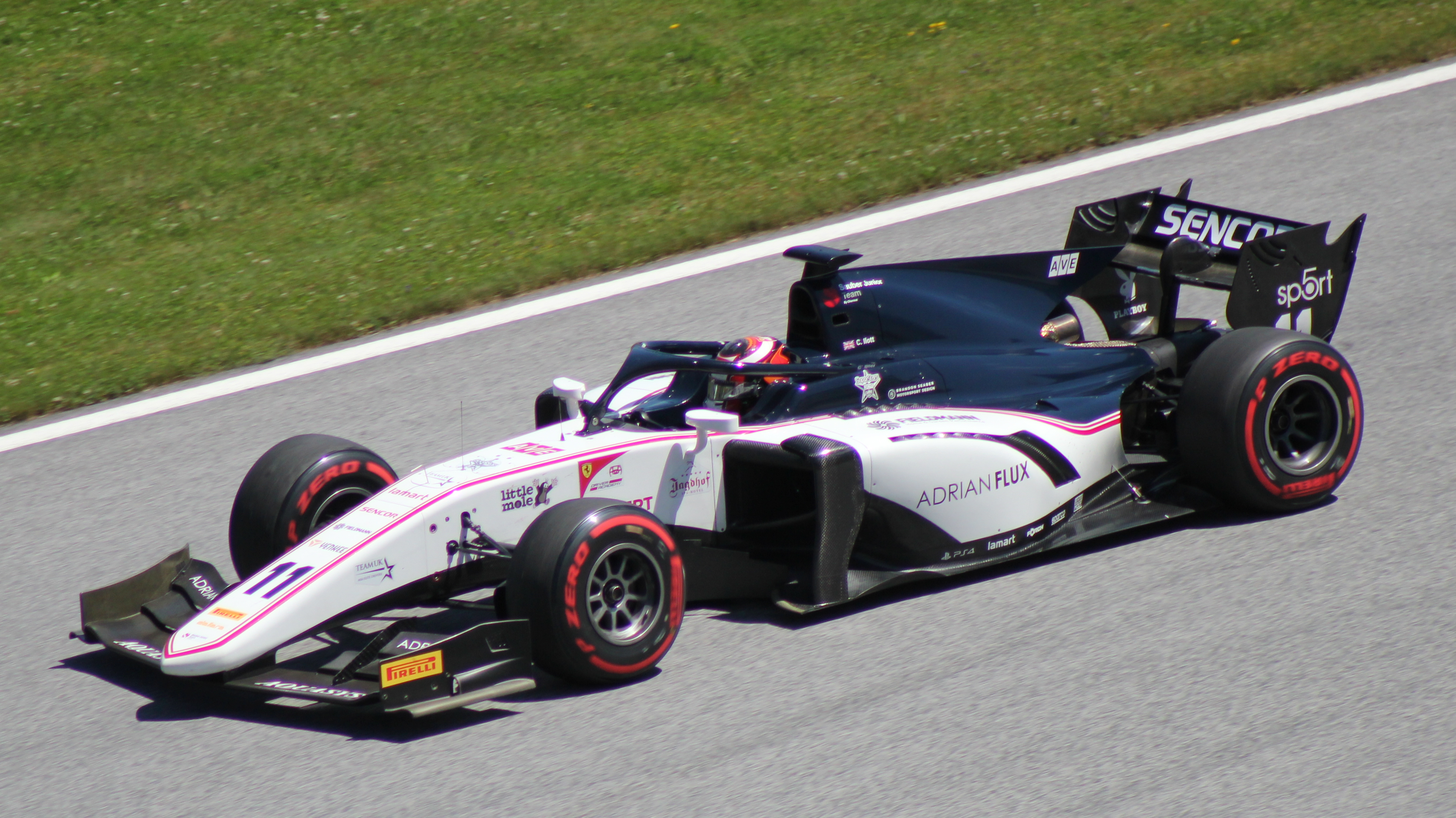 Ilott beim Rennwochenende in Österreich 2019